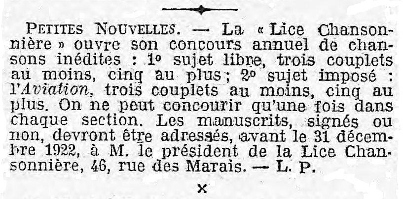 Annonce du concours organisé par la goguette parisienne de la Lice Chansonnière en 1922.